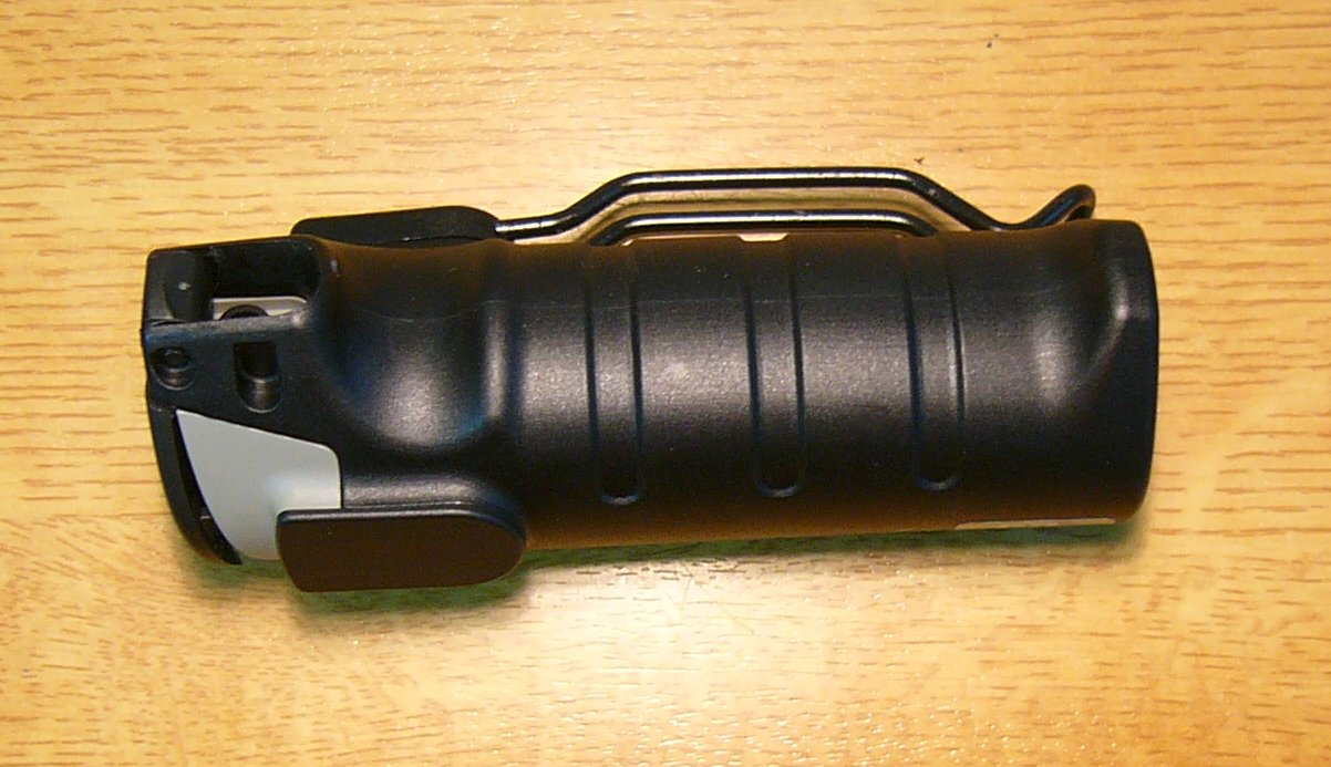 Reizstoffsprühgerät 3 mit oleorum capsicum - RSG 3 (Curd's Police), IDC System AG, Switzerland.